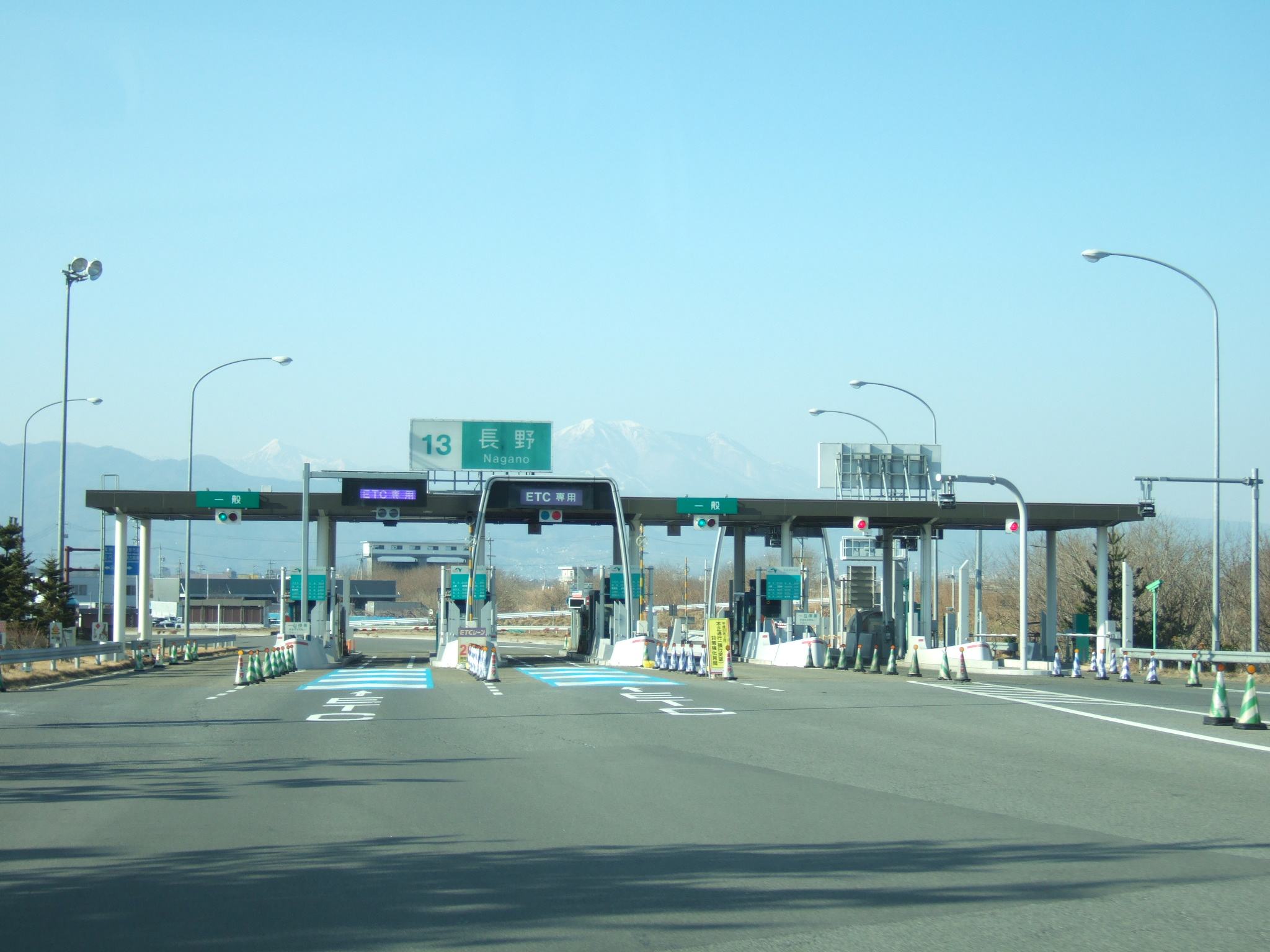 長野IC